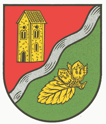 Wappen von Nußbach (Pfalz)